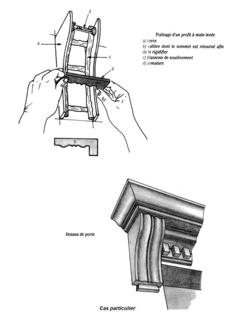 Les staffeuses/staffeurs utilisent cette technique de traînage pour confectionner un élément de dessus de porte par exemple.